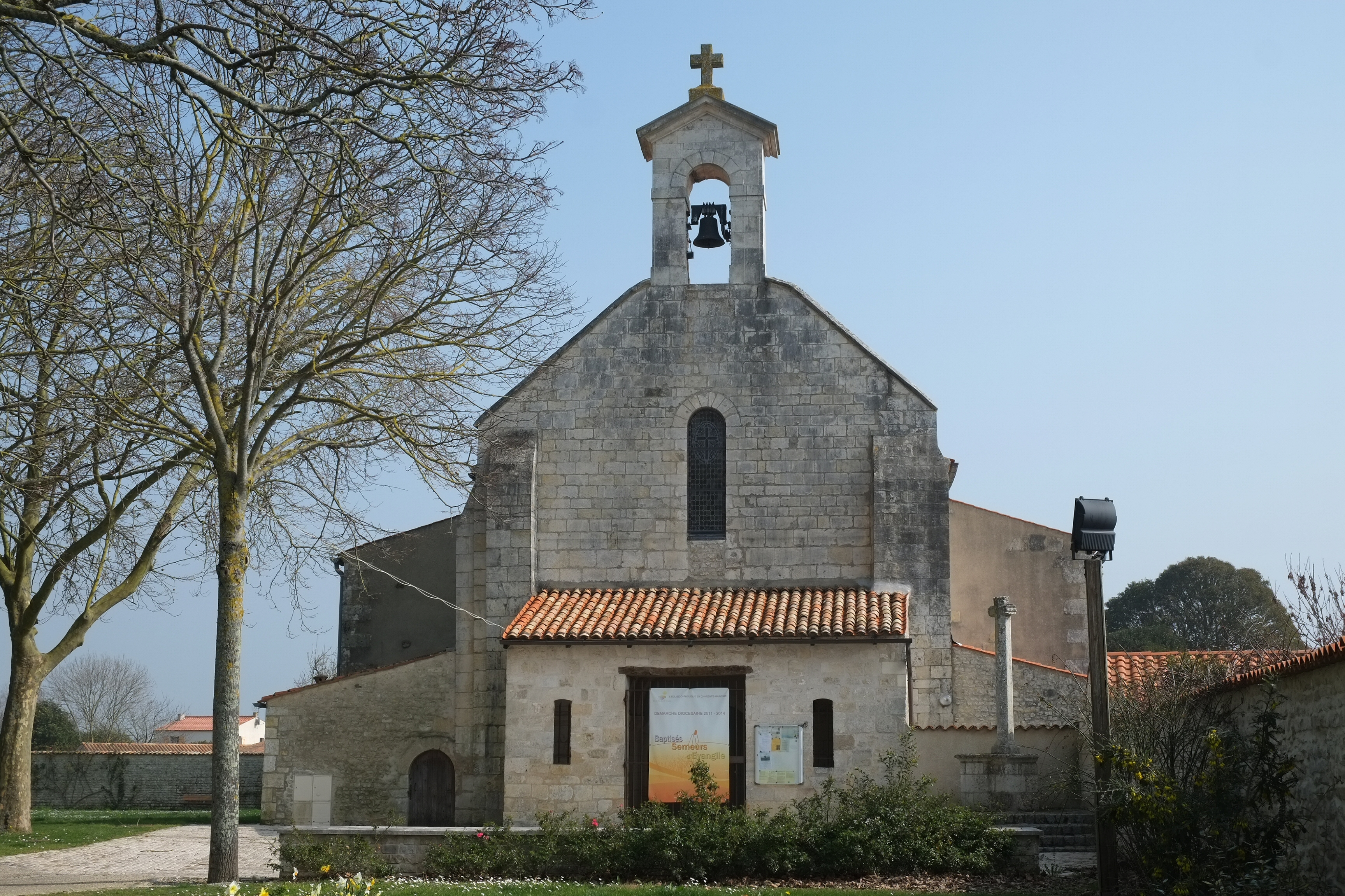 Église Notre-Dame de l'Assomption Lagord Charente-Maritime France